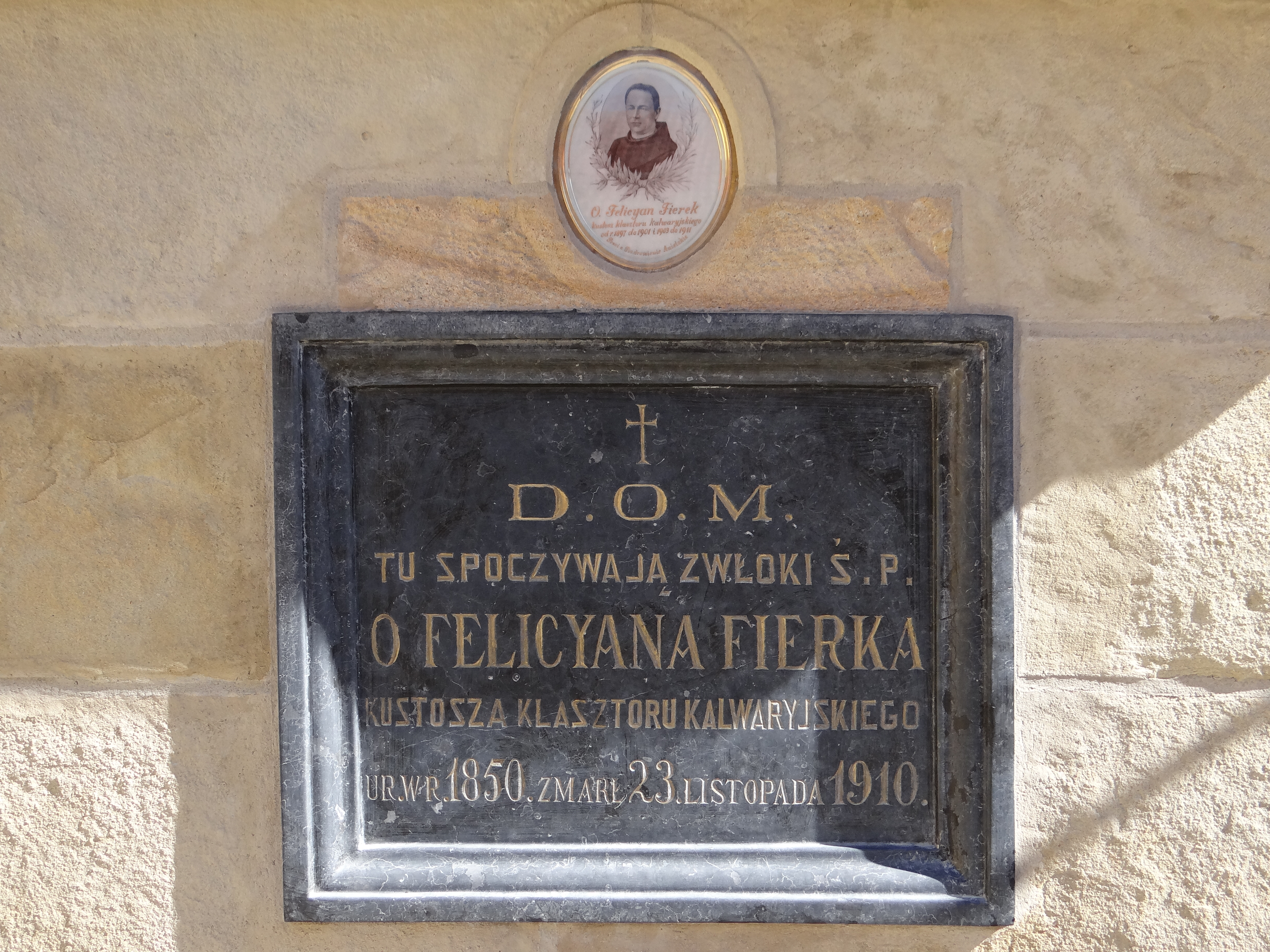 Małopolska. Kalwaria Zebrzydowska. Zespół klasztorny bernardynów. Tablica nagrobna w murze kościoła.